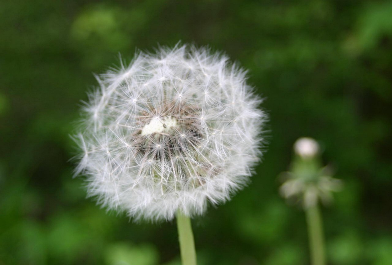 Taraxacum vulgare: Seed head.